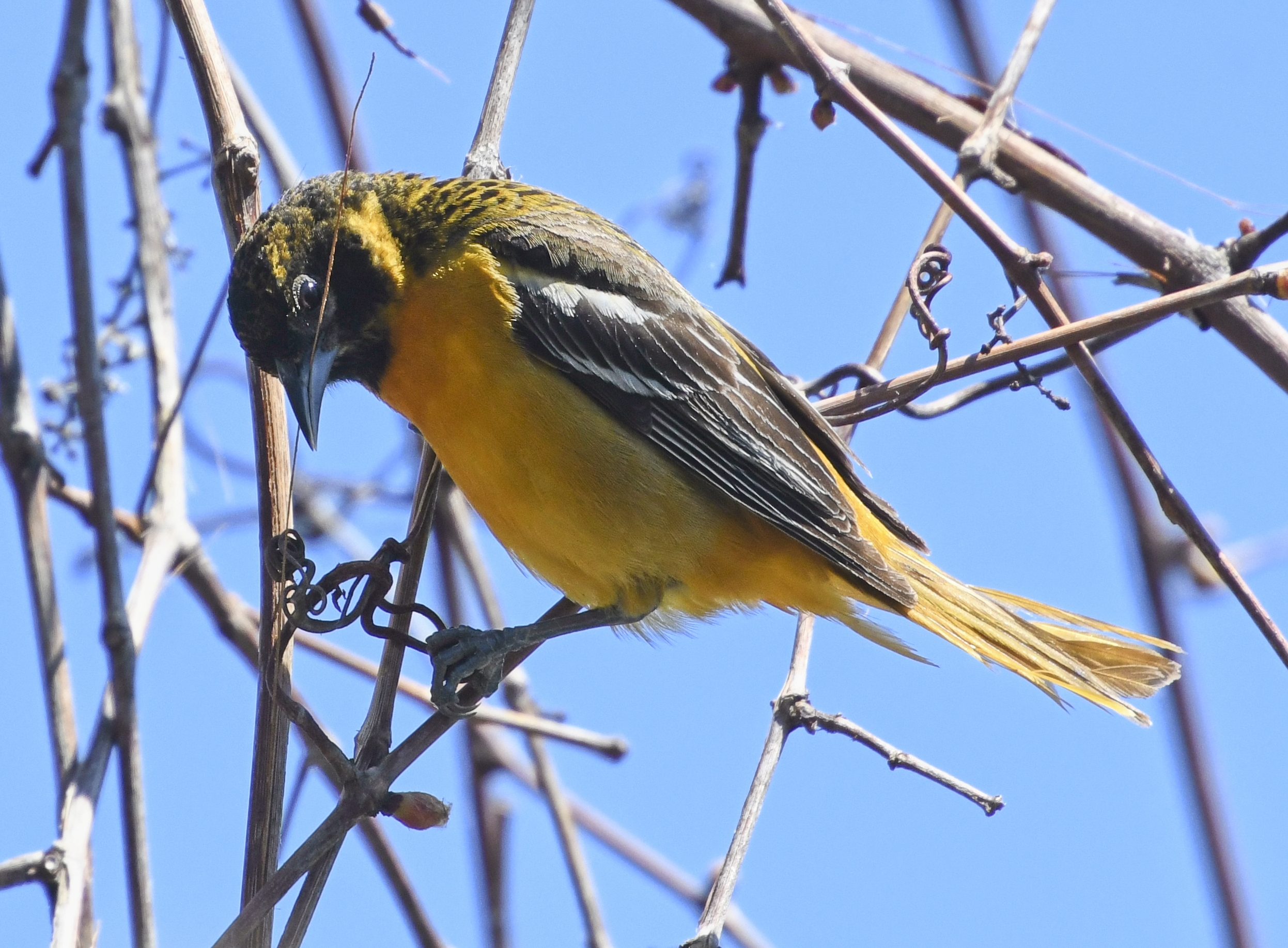 Самиця трупіала балтиморського (Icterus galbula) відщеплює волокно дикого винограду на гніздо в парку Полковника Семюела Сміта в Торонто